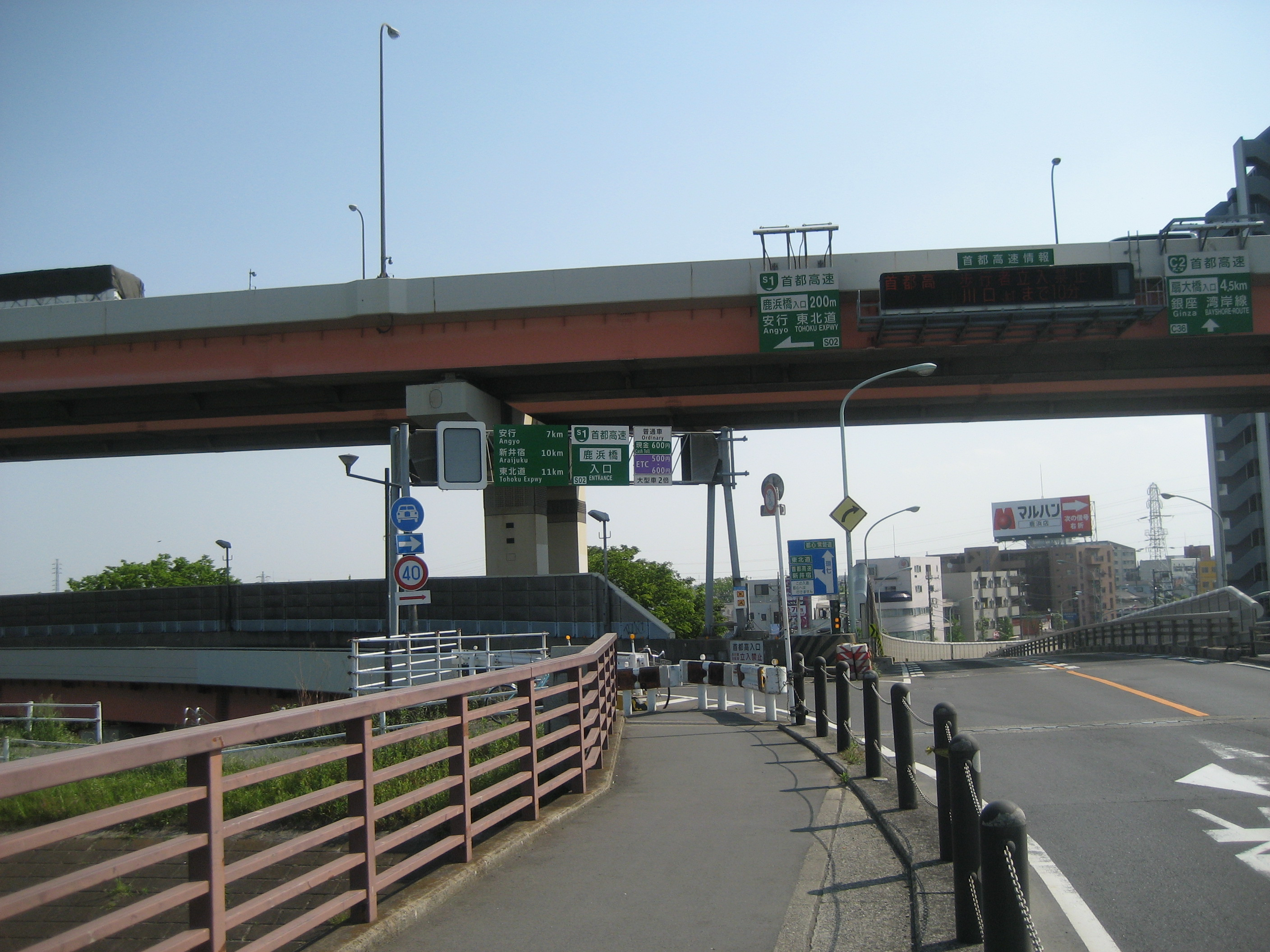 首都高速川口線鹿浜橋入口（都道318号線側の入口）